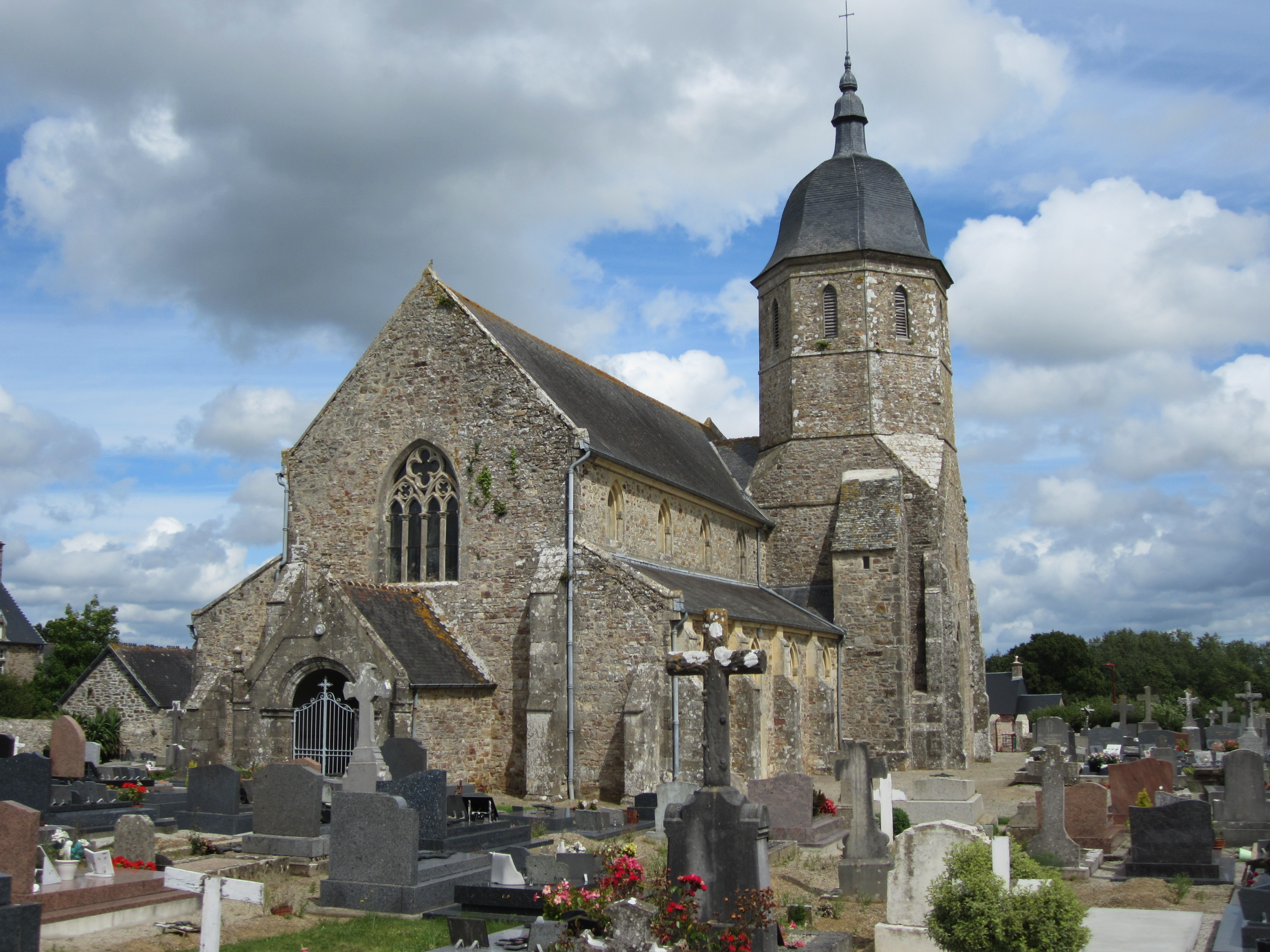 Église Saint-Laurent de Rauville-la-Place